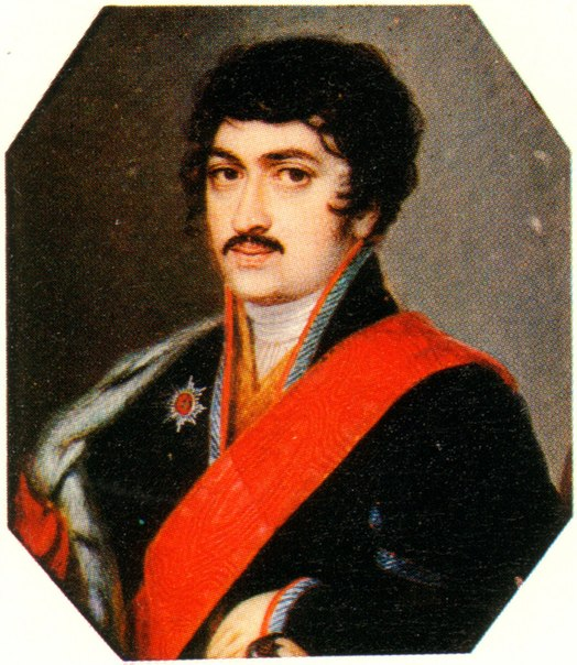 Грузинский царевич Теймураз Георгиевич Багратион (1782 – 1846)